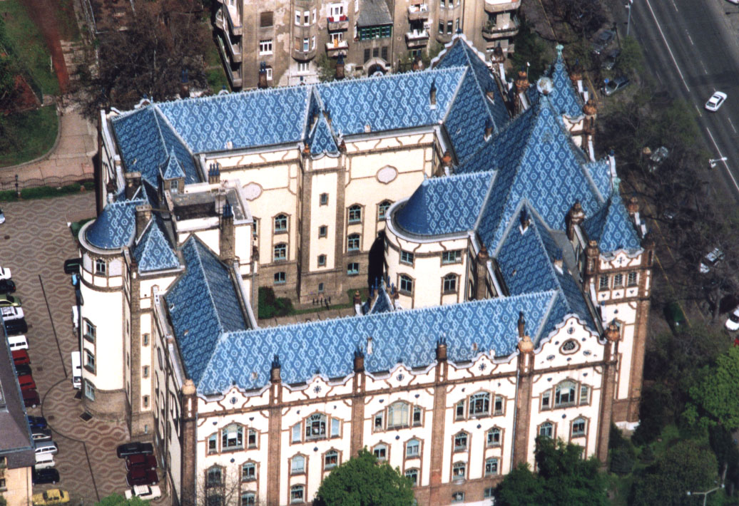 Földtani Intézet - Budapest - Hungary - Europe